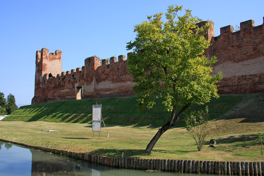 Un tratto delle mura medioevali di Castelfranco Veneto